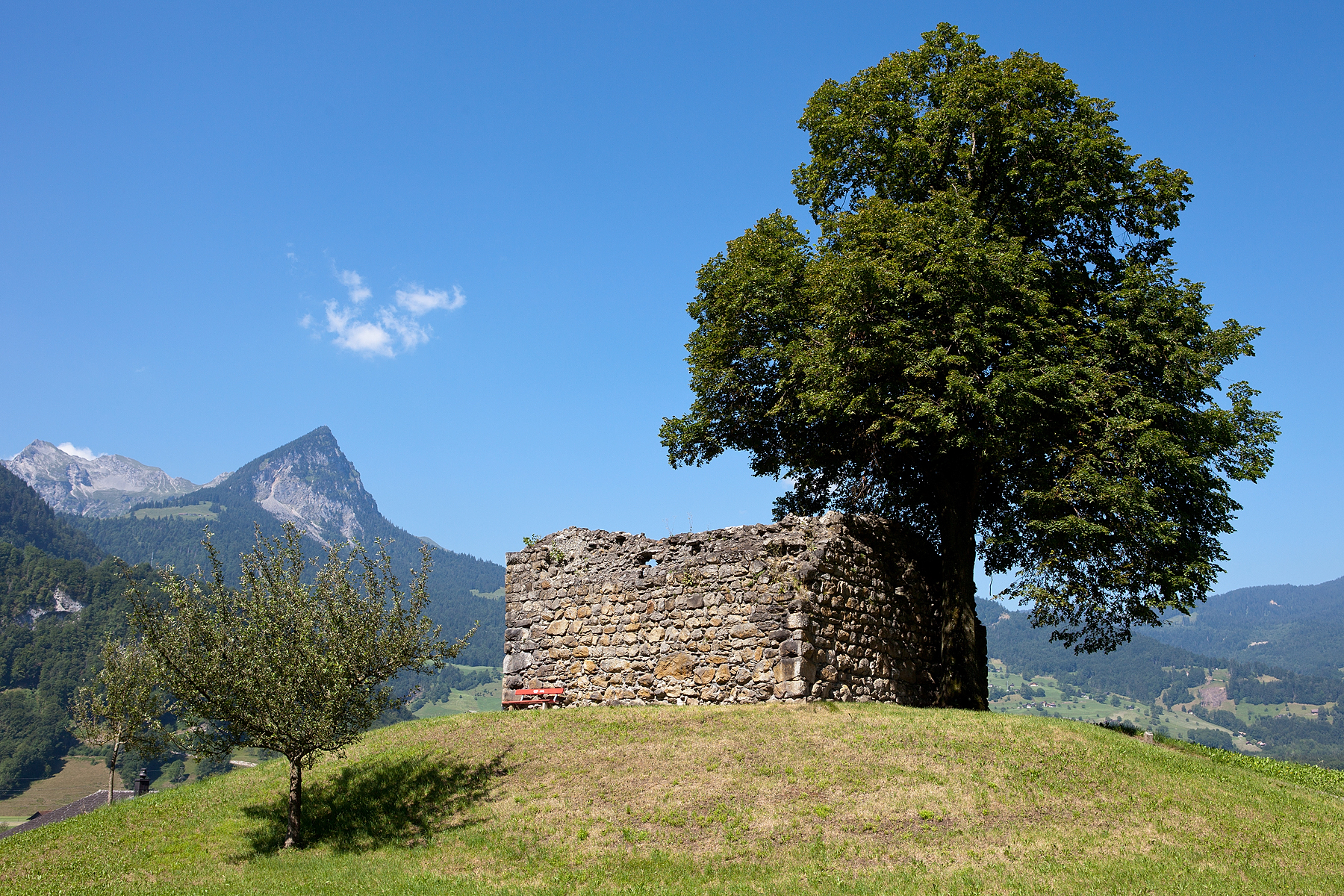 Ruine Burg Rudenz (13. Jahrhundert) in Giswil